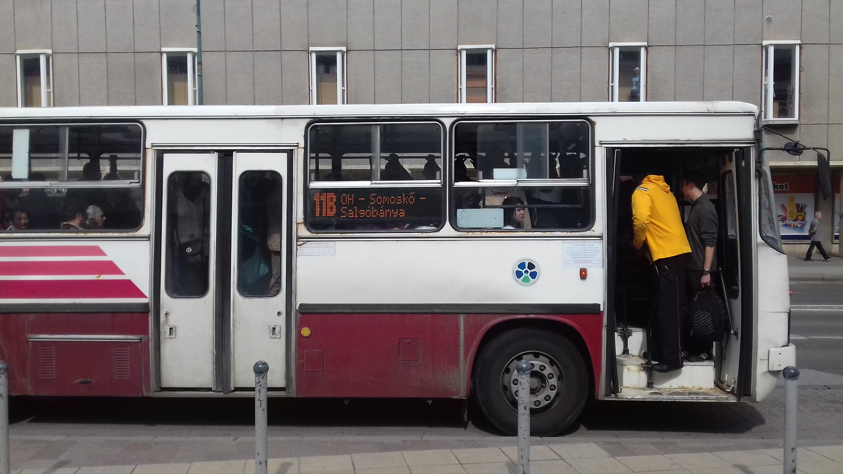 11B járat Salgótarján Főterén